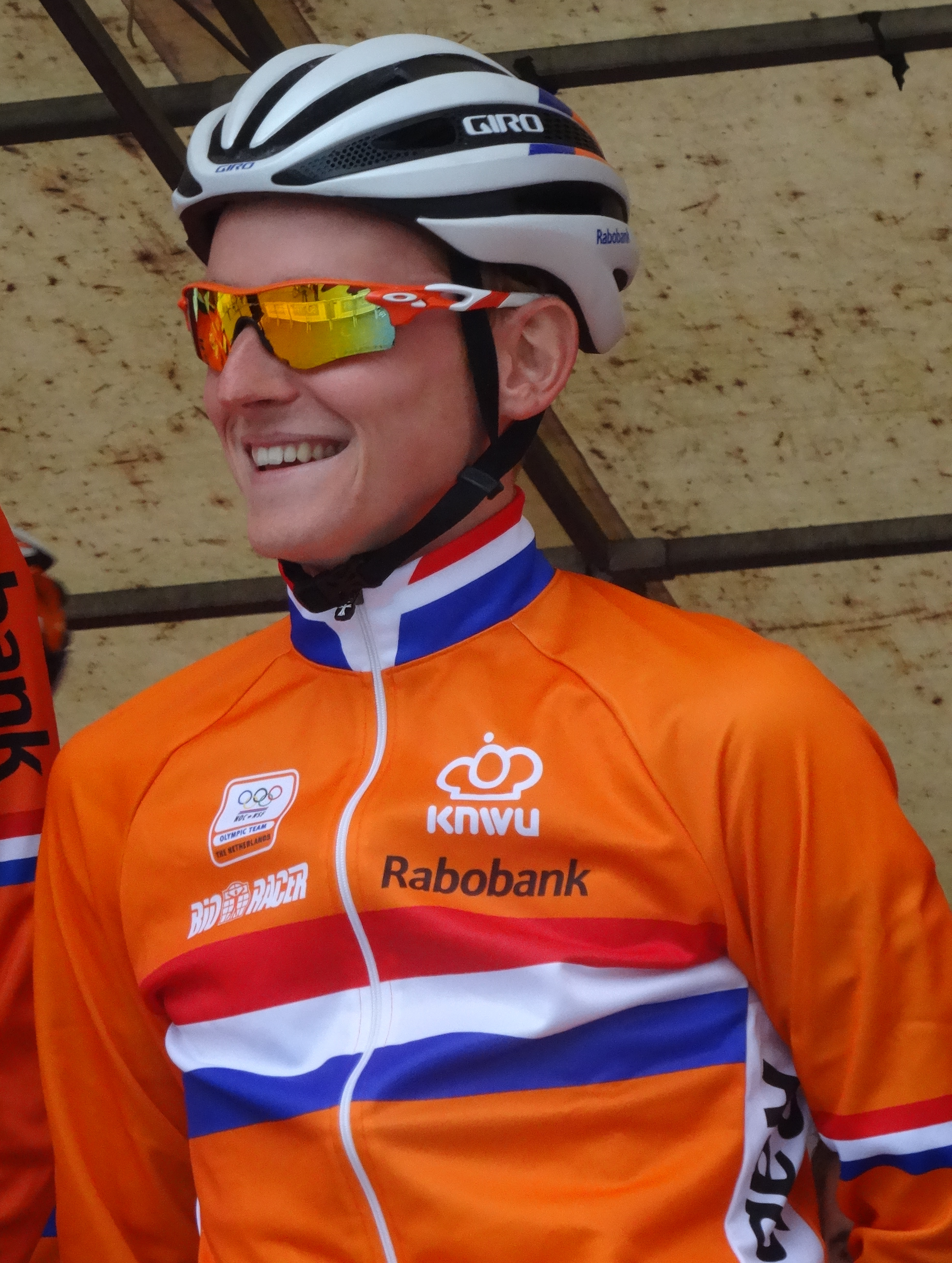 Reportage photographique réalisé le dimanche 14 septembre à l'occasion du départ et de l'arrivée du Grand Prix Jef Scherens 2014 à Louvain, Belgique.